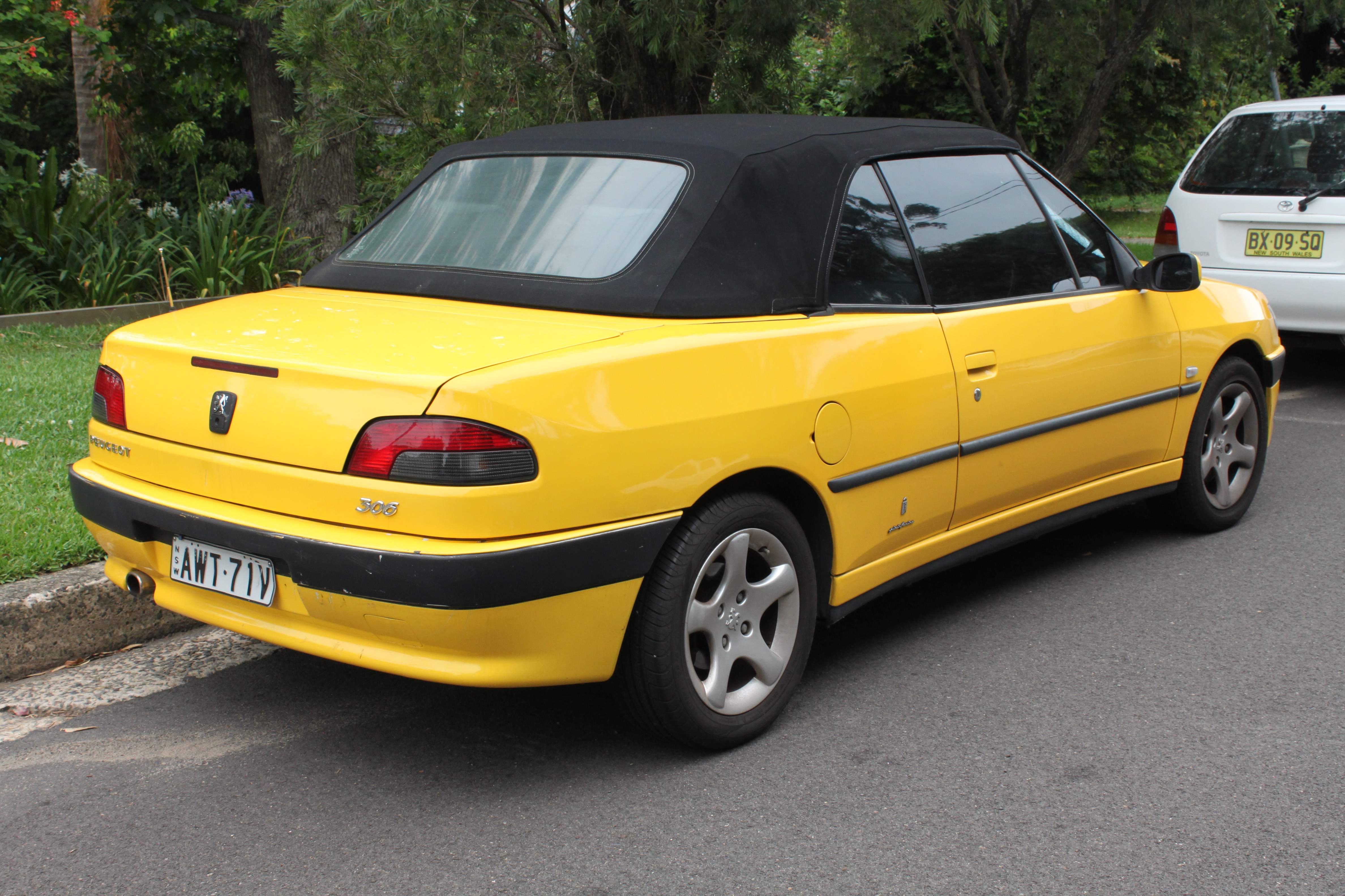 Peugeot 306 Convertible